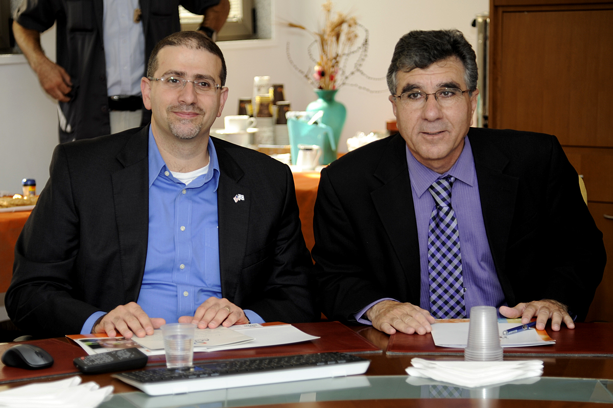 Ambassador Shapiro visit to Achva Academic College